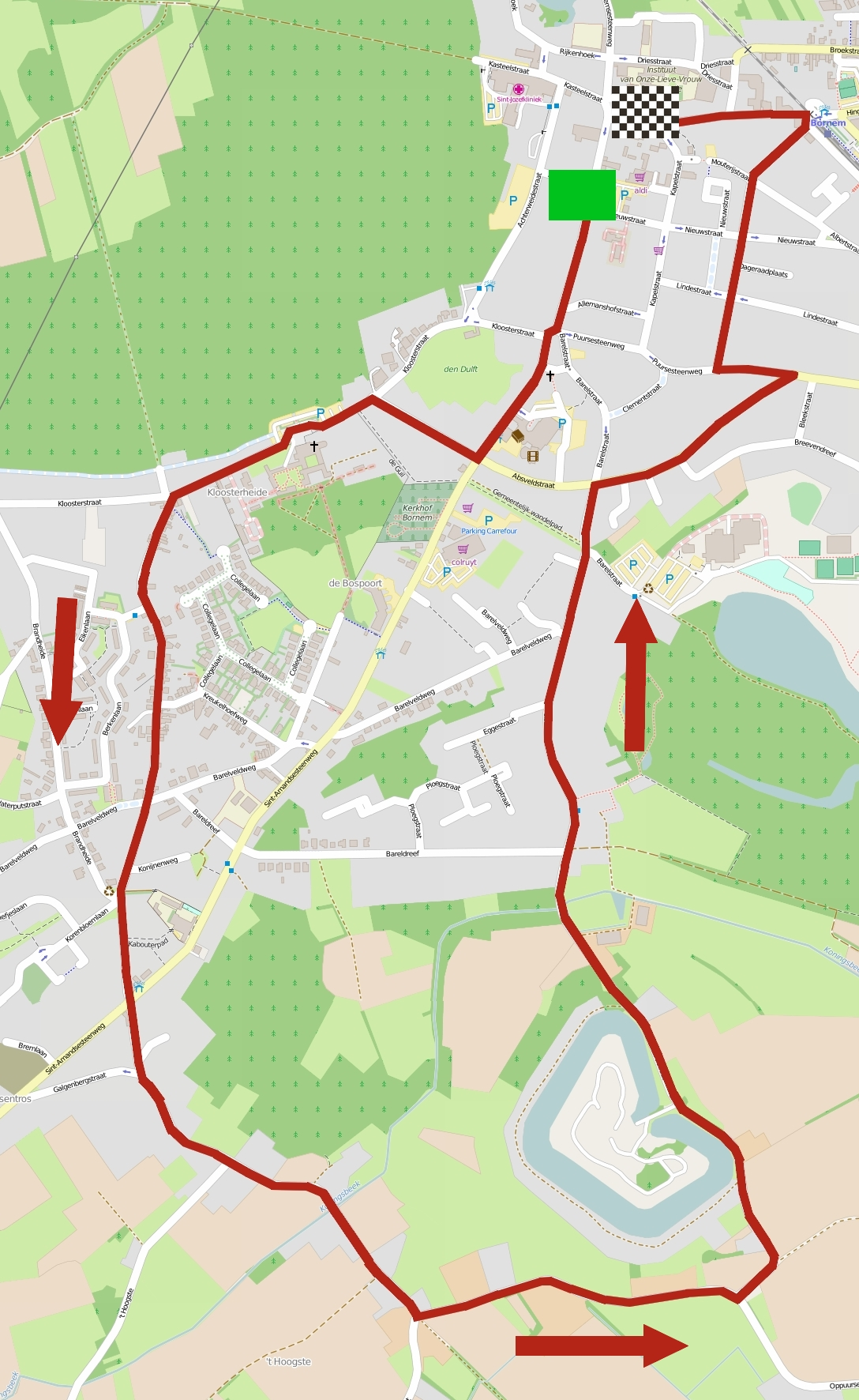 Parcours du prologue du Tour de Belgique 2015 à Bornem. This map may be incomplete, and may contain errors. Don't rely solely on it for navigation.